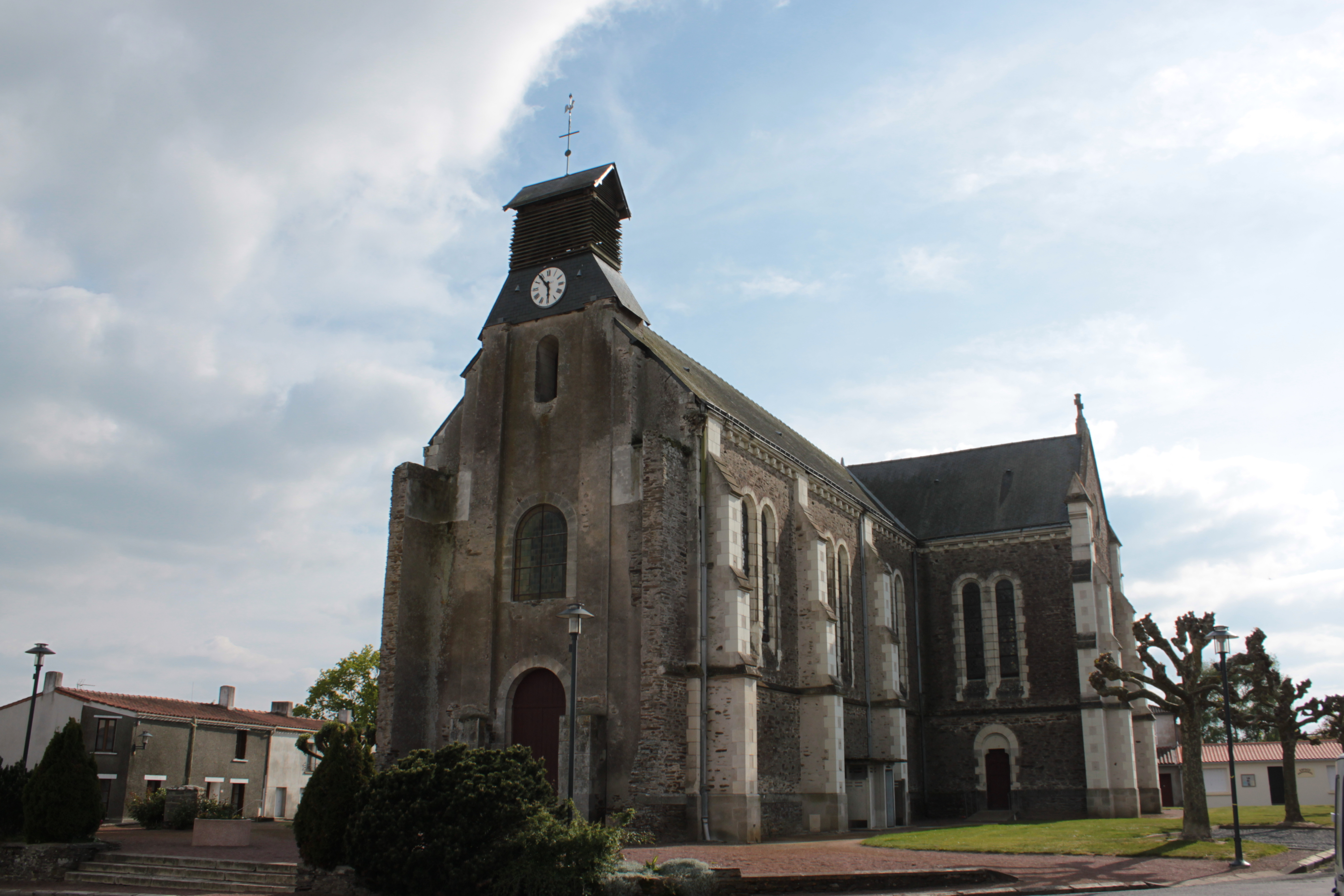 Église Sainte-Marie-Madeleine, XIX°, Barbechat.